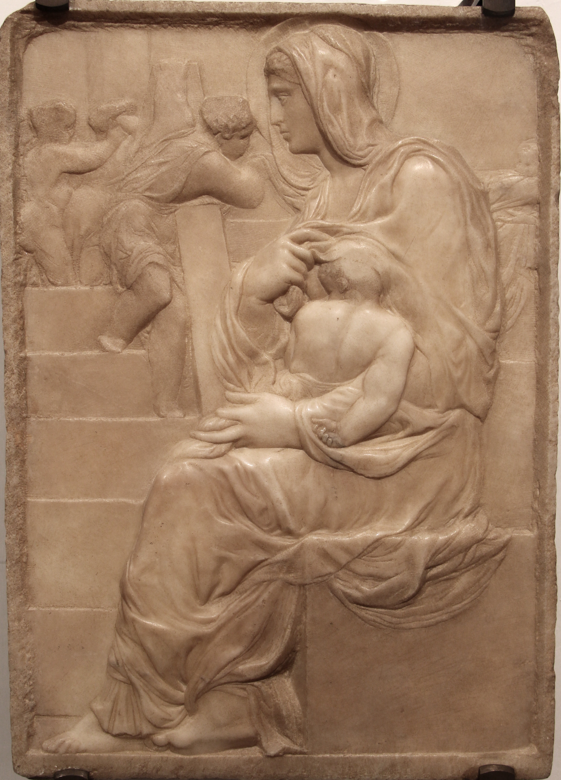 Casa Buonarroti, Firenze